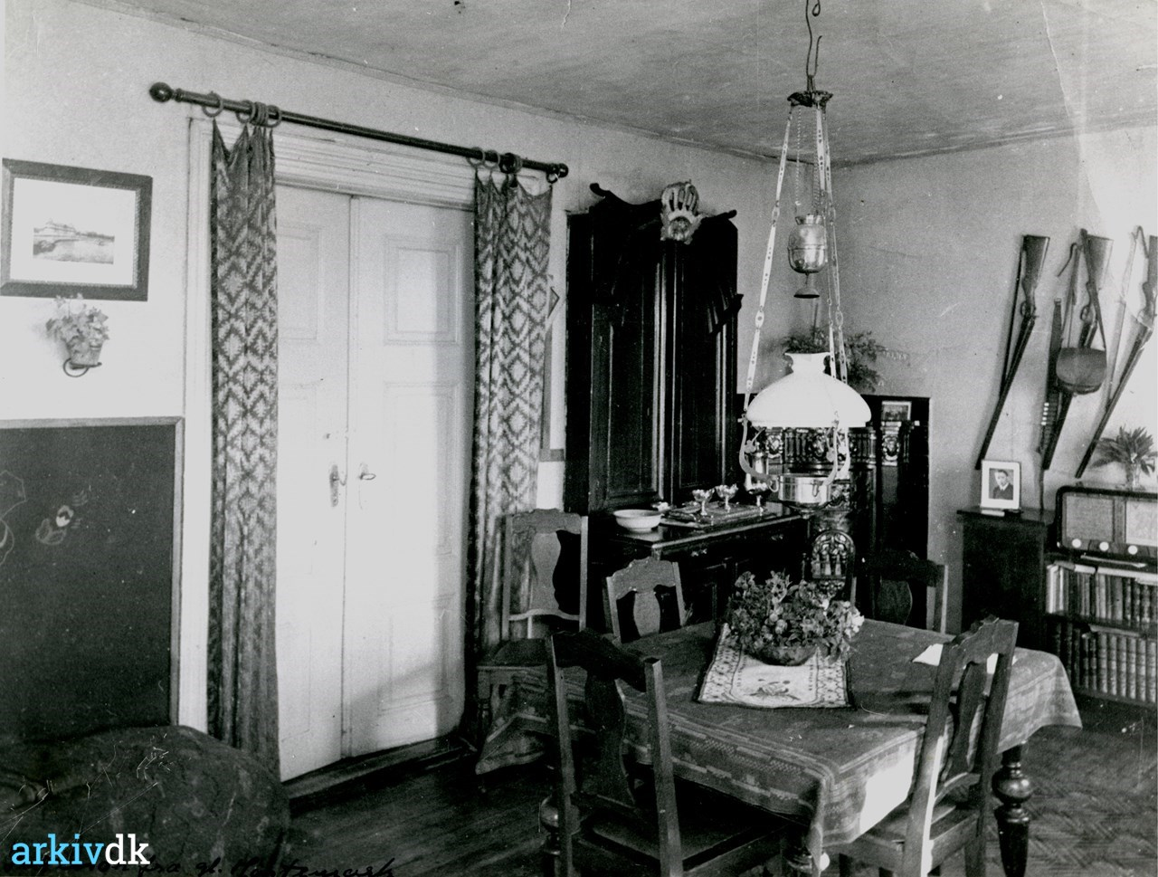 Inddørs billede af Gammel høstemark inden fra stuen. Skabet til højre fra døren findes der kun 2 af i Danmark, skabet findes stadig i bygningen.